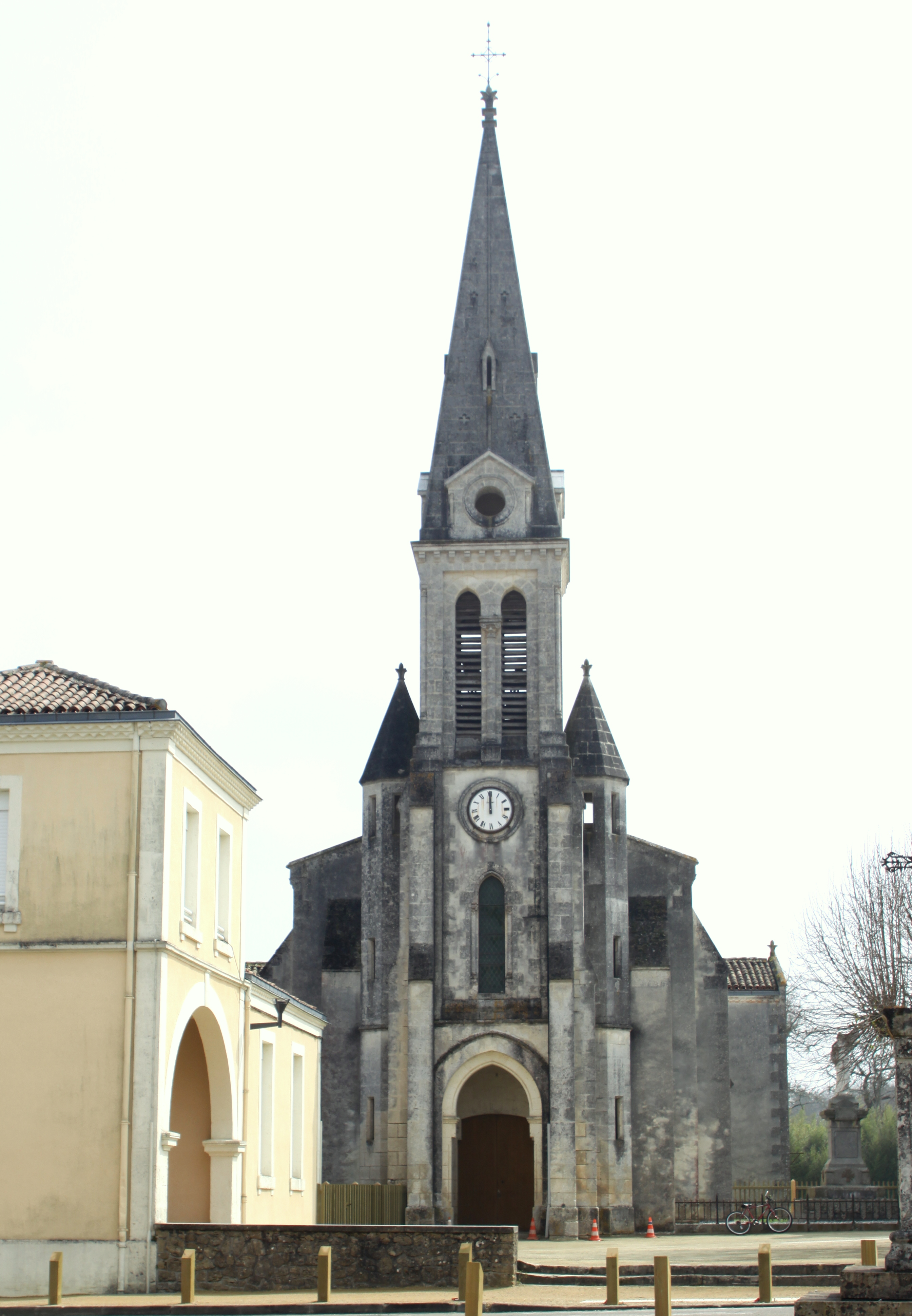 D'Kierch vu Le Sen